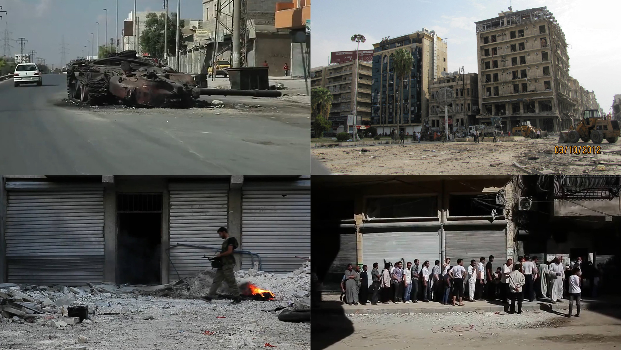 коллаж